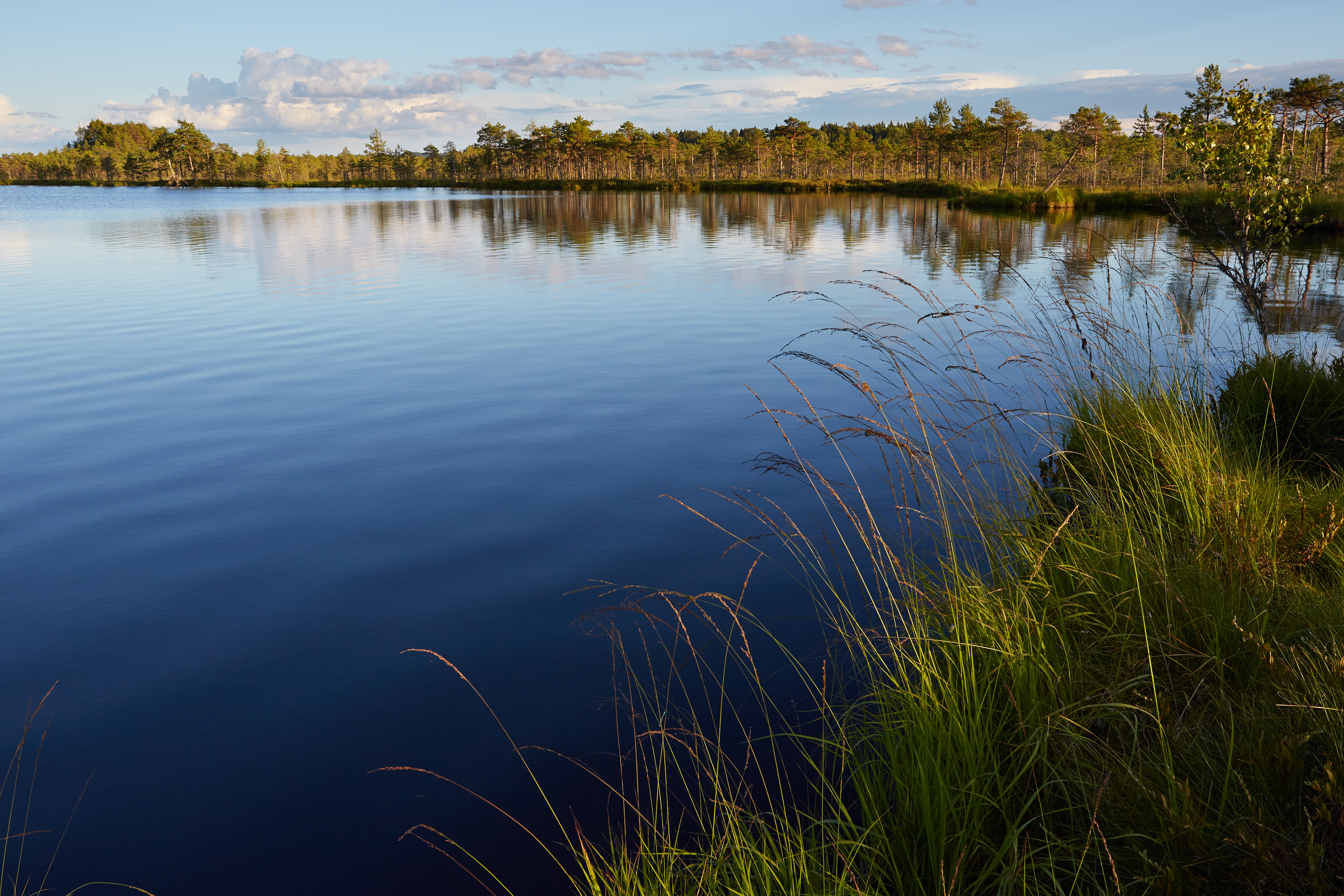 Mustjärv Luhasoo maastikukaitsealal